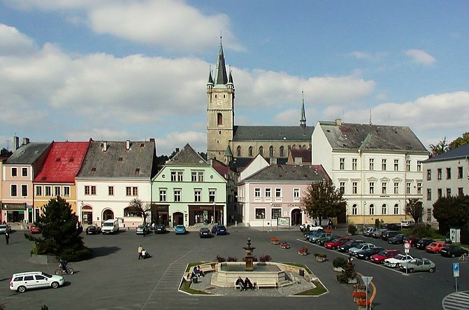 tachov náměstí